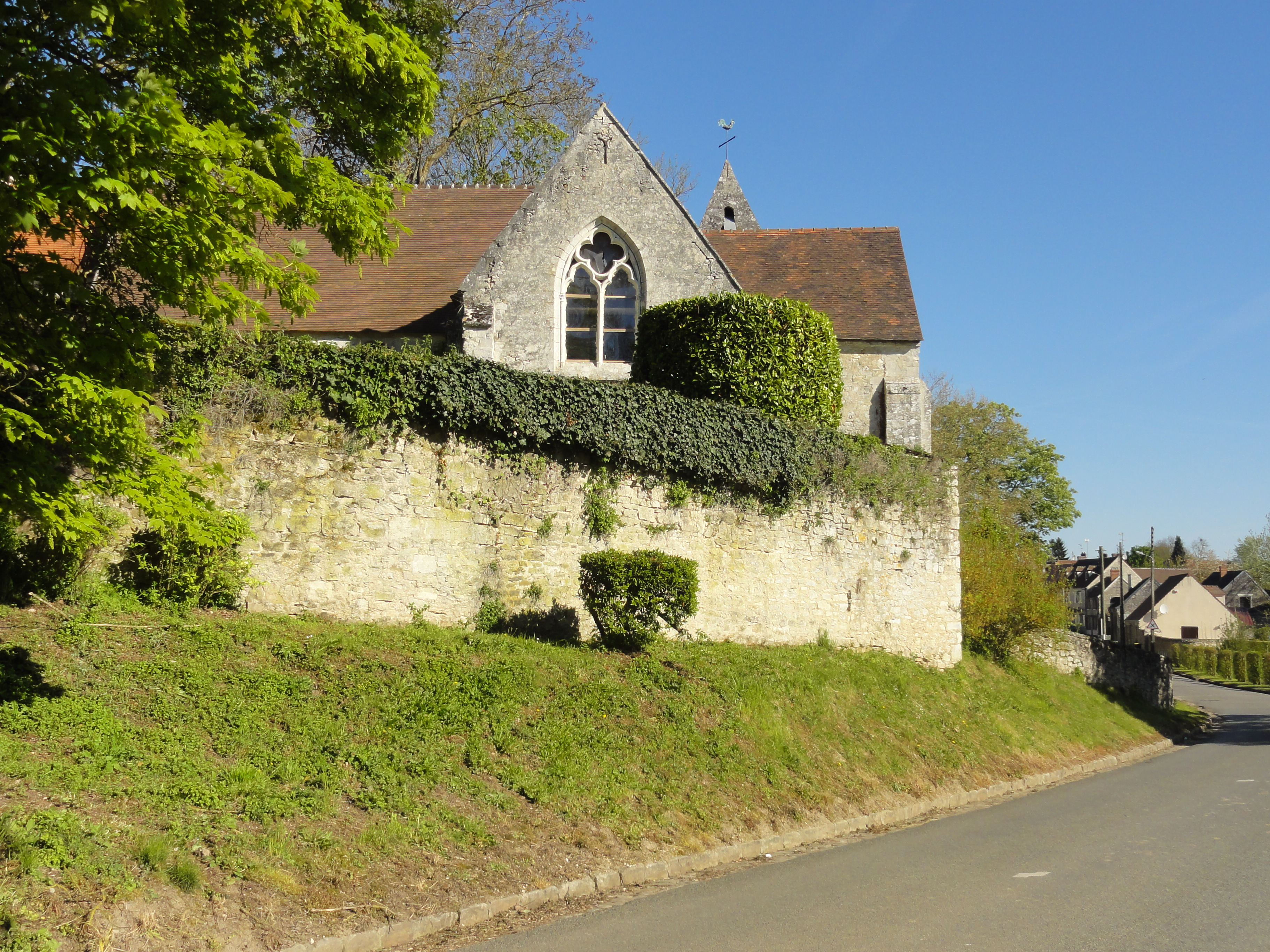 Église Saint-Georges de Bray - voir titre.